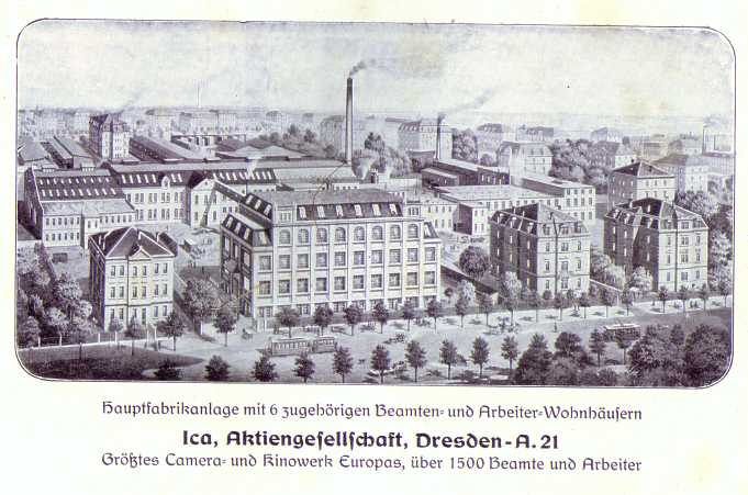 Tovární budovy Ica a obytné domy pro děníky v Drážďanech, Schandauer Straße 74/76